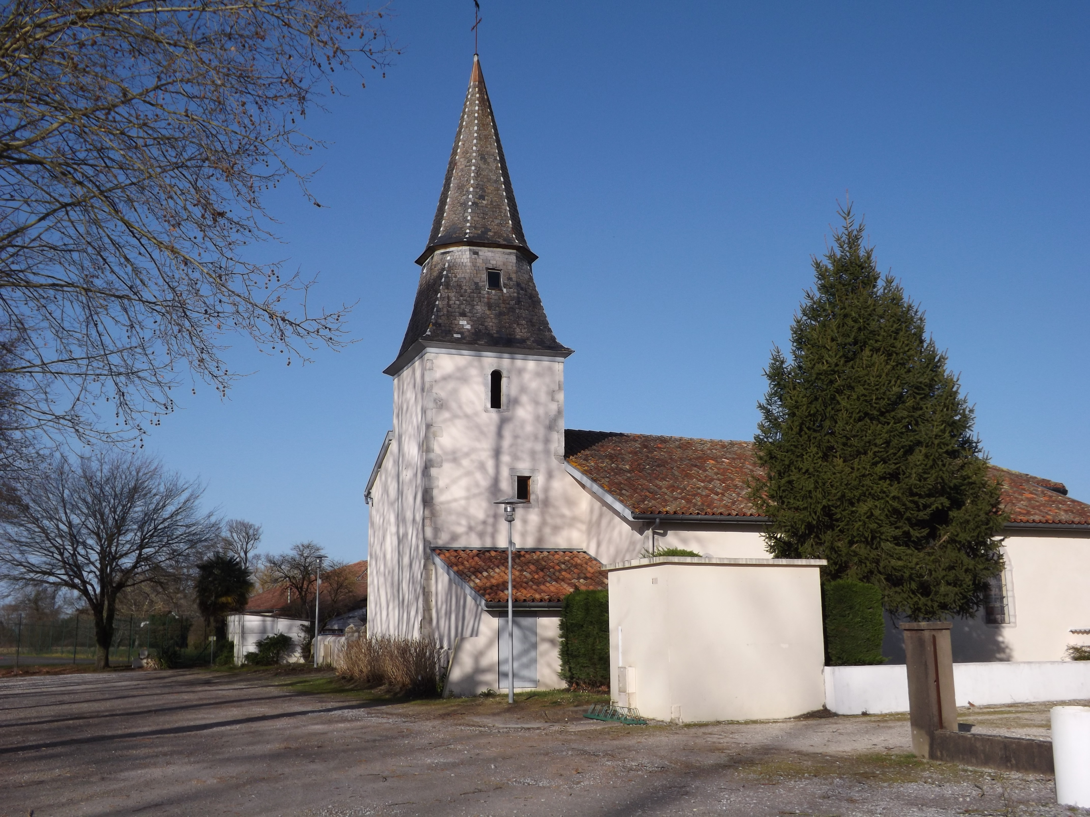 Glèisa d'Arsague, Shalòssa, Gasconha